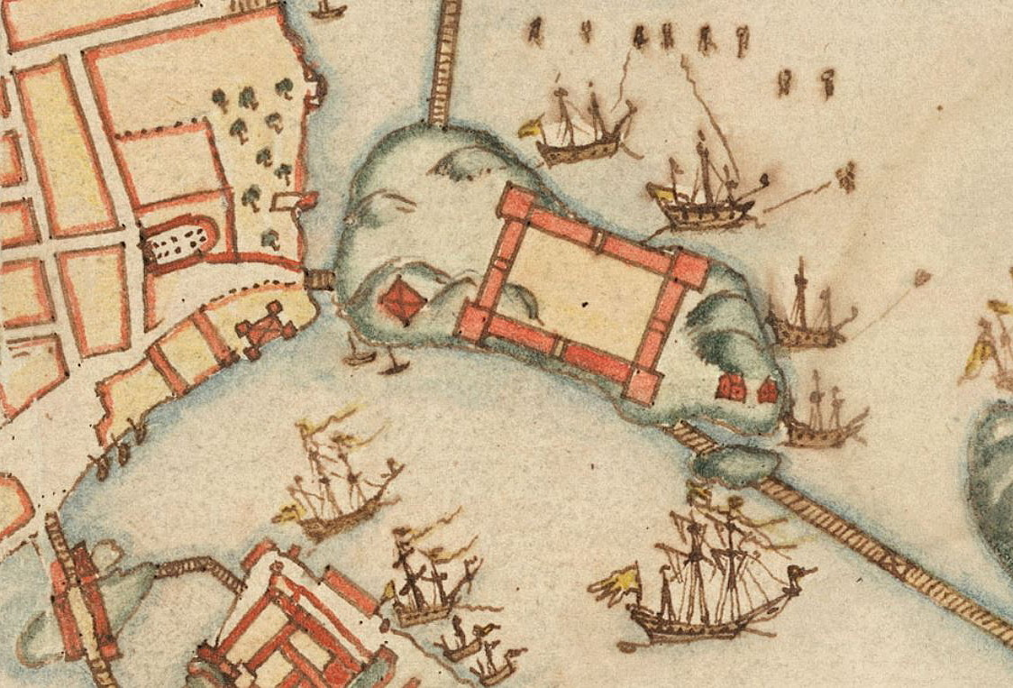 Stockholms 1642, detalj